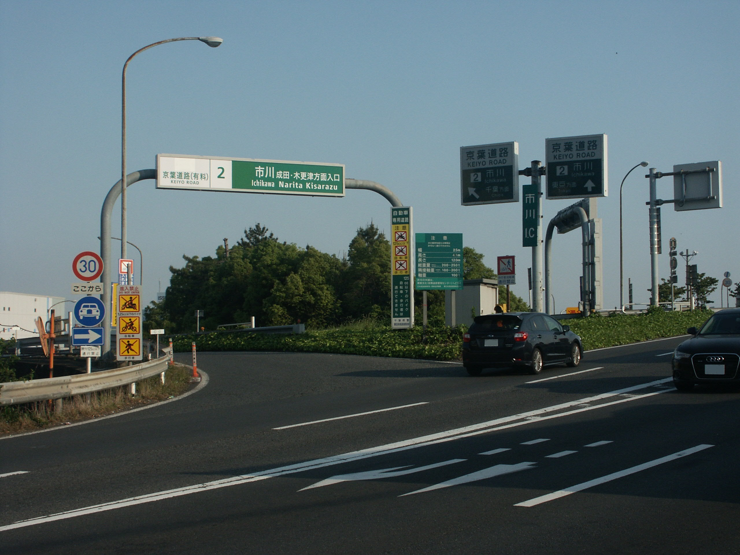 京葉道路市川インターチェンジ入口（成田、木更津方面入口）